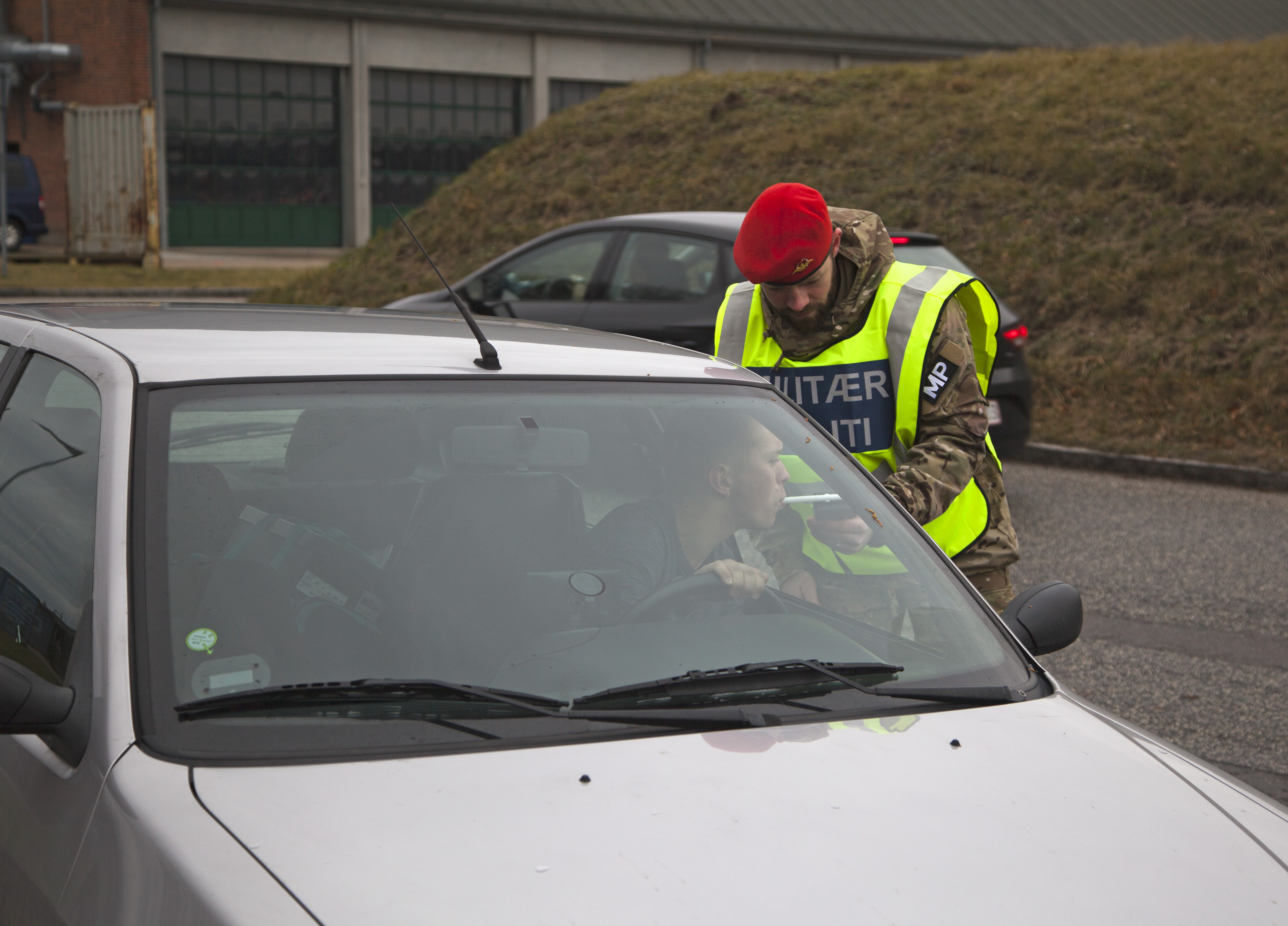 Militærpoltiet foretager alkoholkontrol